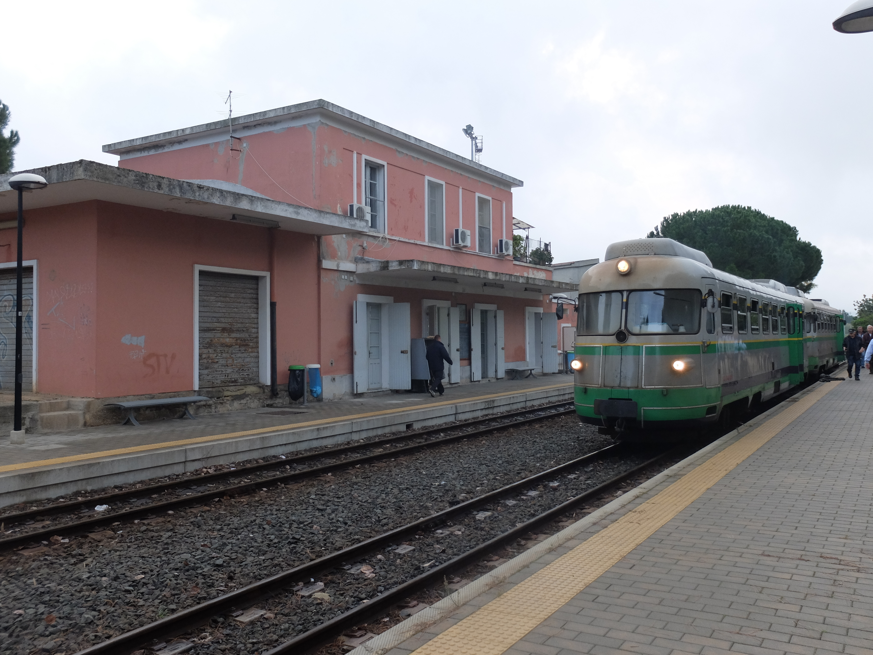 Dolianova (Bahnhof) mit ADe 442.005